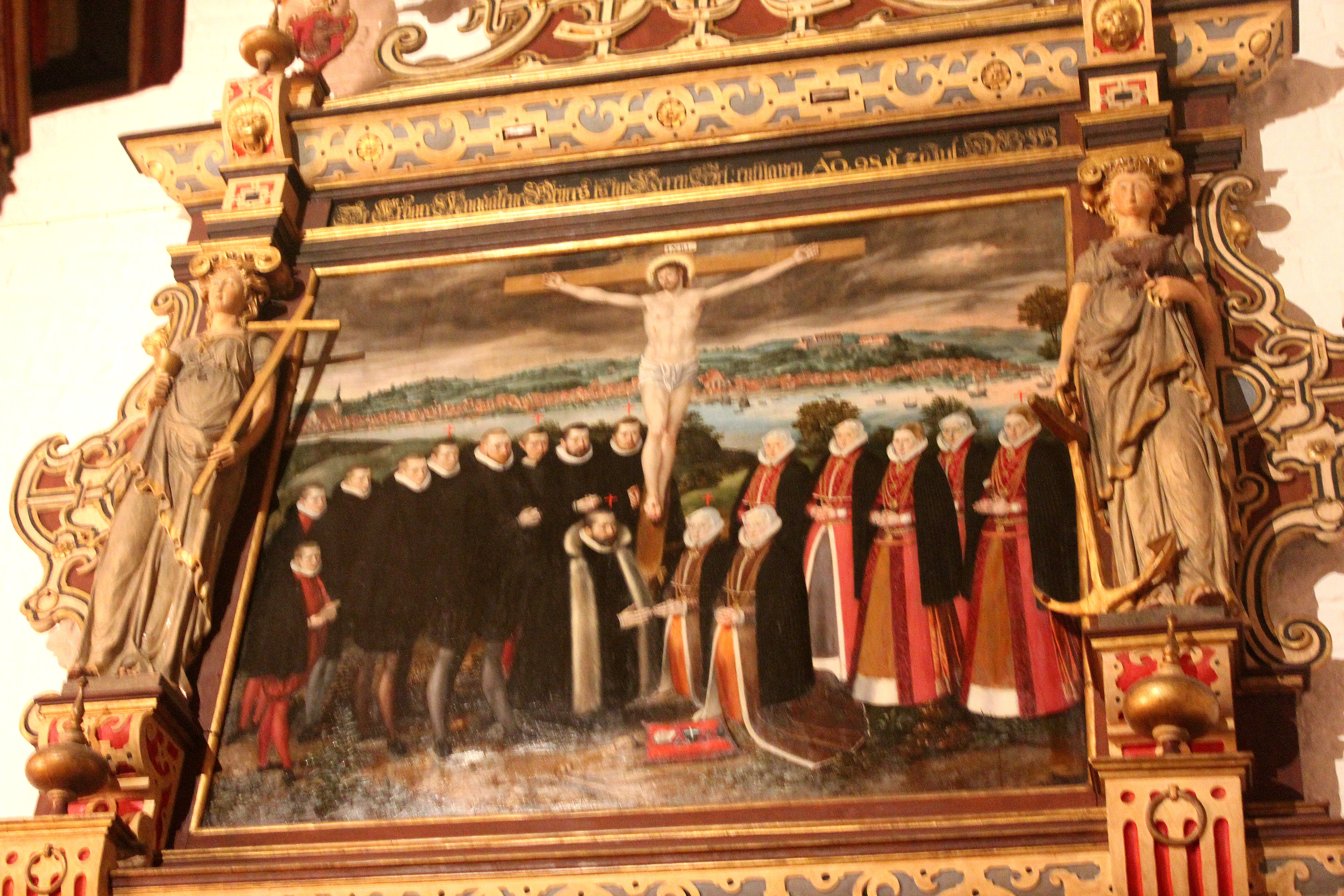 Beyersche Epitaph in St. Marien (Flensburg) von 1591